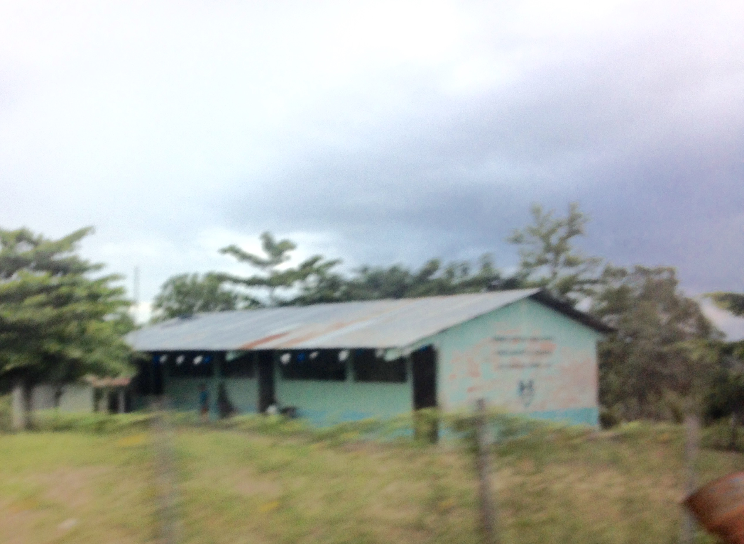 Escuela rural en San Francisco, Petén, Guatemala. Diciembre de 2015.